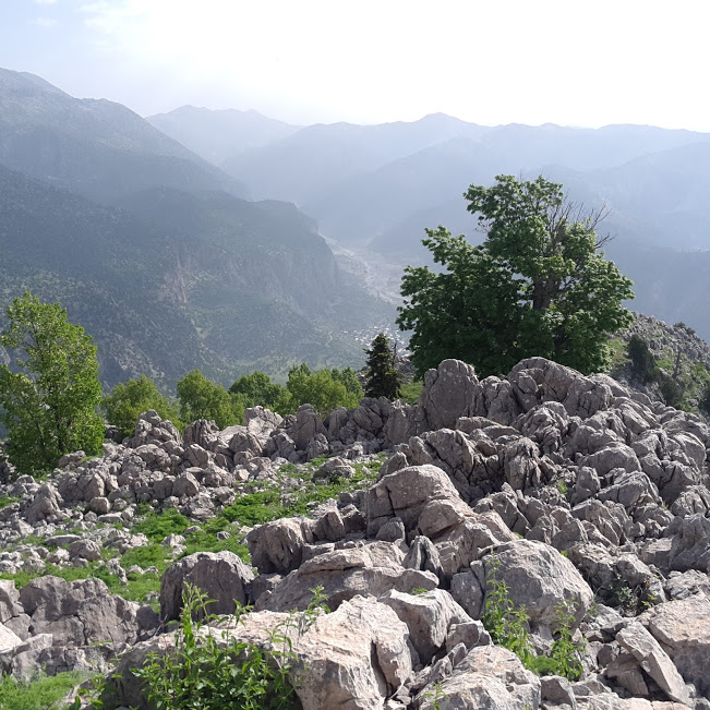 duzak dağından ulupınar